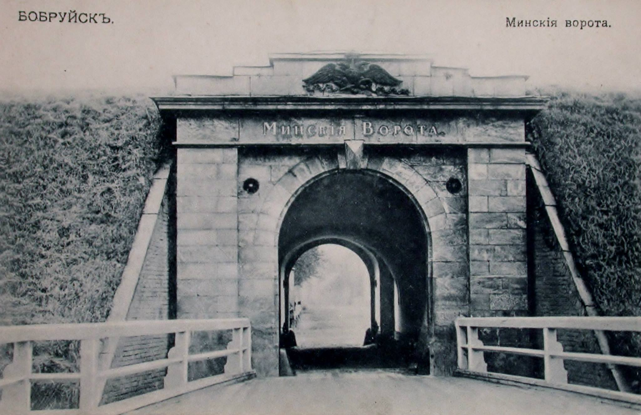 Беларуская (тарашкевіца): Бабруйск (Babrujsk), Менская брама (Mienskaja brama)